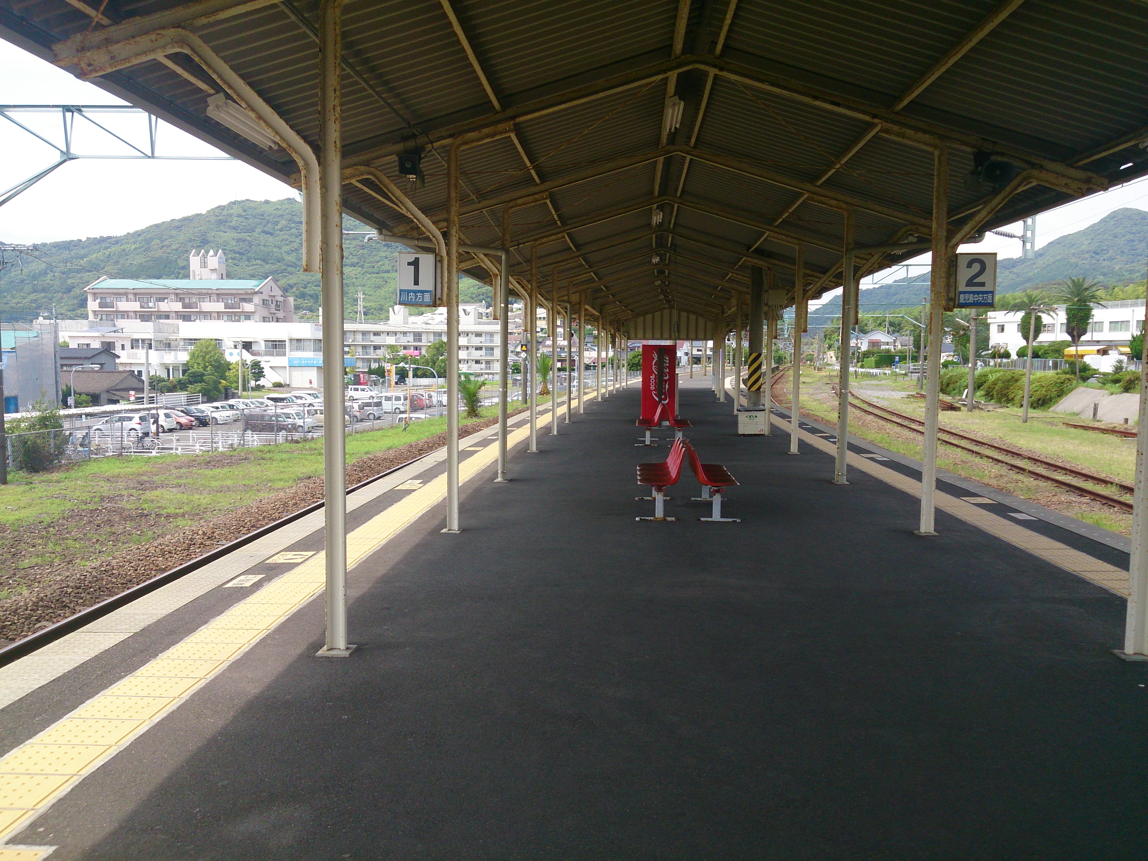 串木野駅ホーム